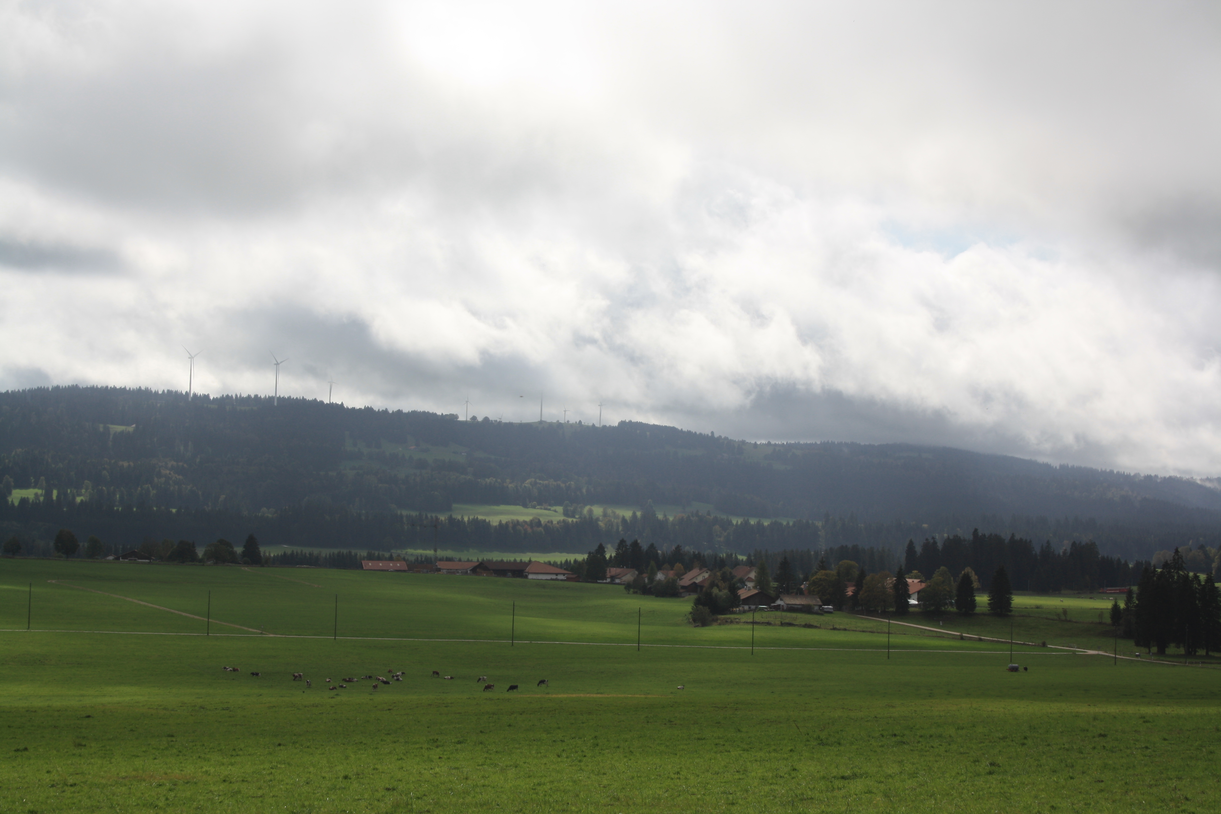 La Chaux-des-Breuleux